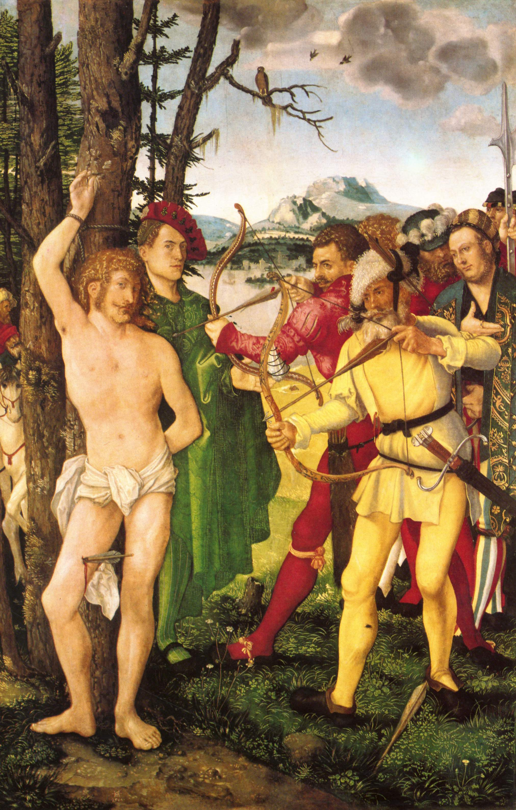 der Mann in grüner Kleidung hinter dem Hl. Sebastian ist wahrscheinlich ein Selbstporträt Hans Baldungs